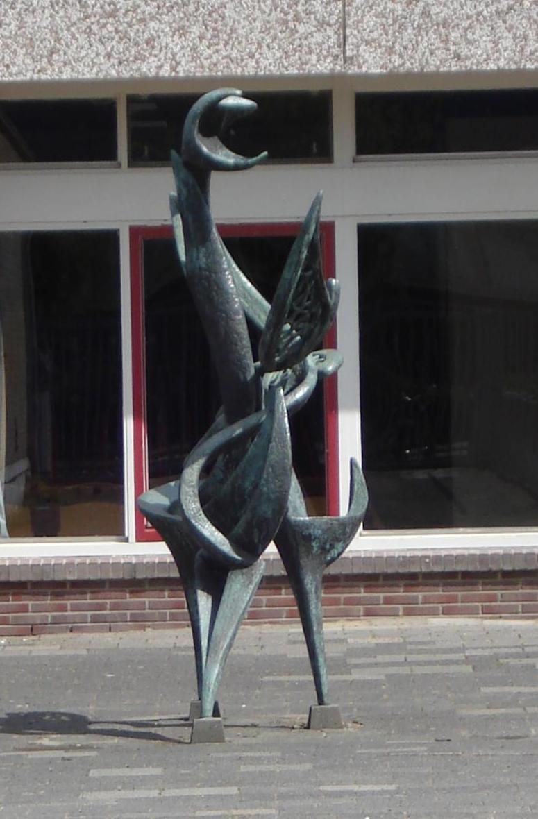 Capelle aan den IJssel, Alkenlaan. Kunstwerk "Groei" van Sonja Meyer. Capelle a/d IJssel/The Netherlands.